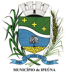 Brasão de Armas do município de Ipeúna - SP - Brasil. instituído pela LEI N° 6 DE 26 DE AGOSTO DE 1965